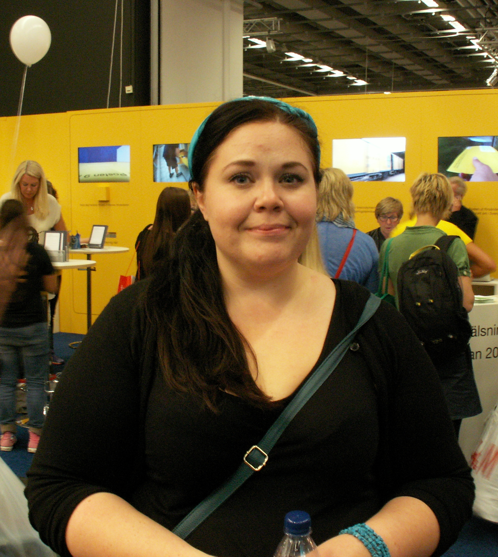 Malin Biller på Bokmässan i Göteborg 2013.